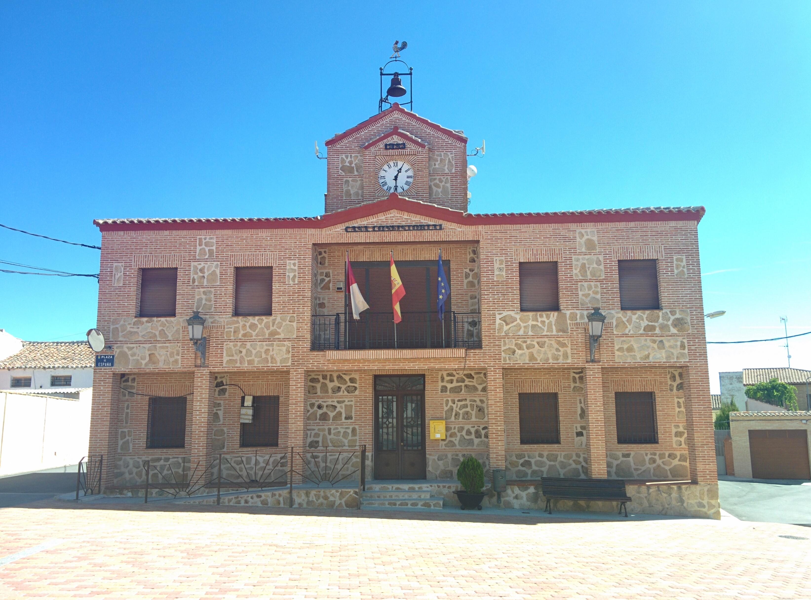 Casa consistorial de Casasbuenas (Toledo, España).